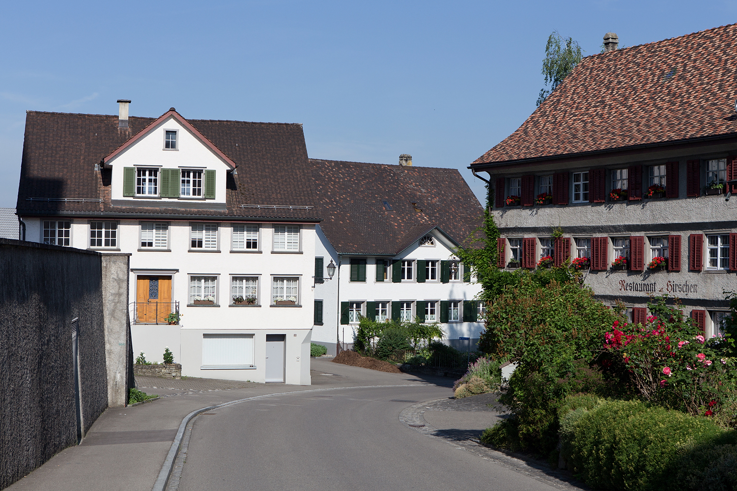 Altes Zollhaus in Sulgen